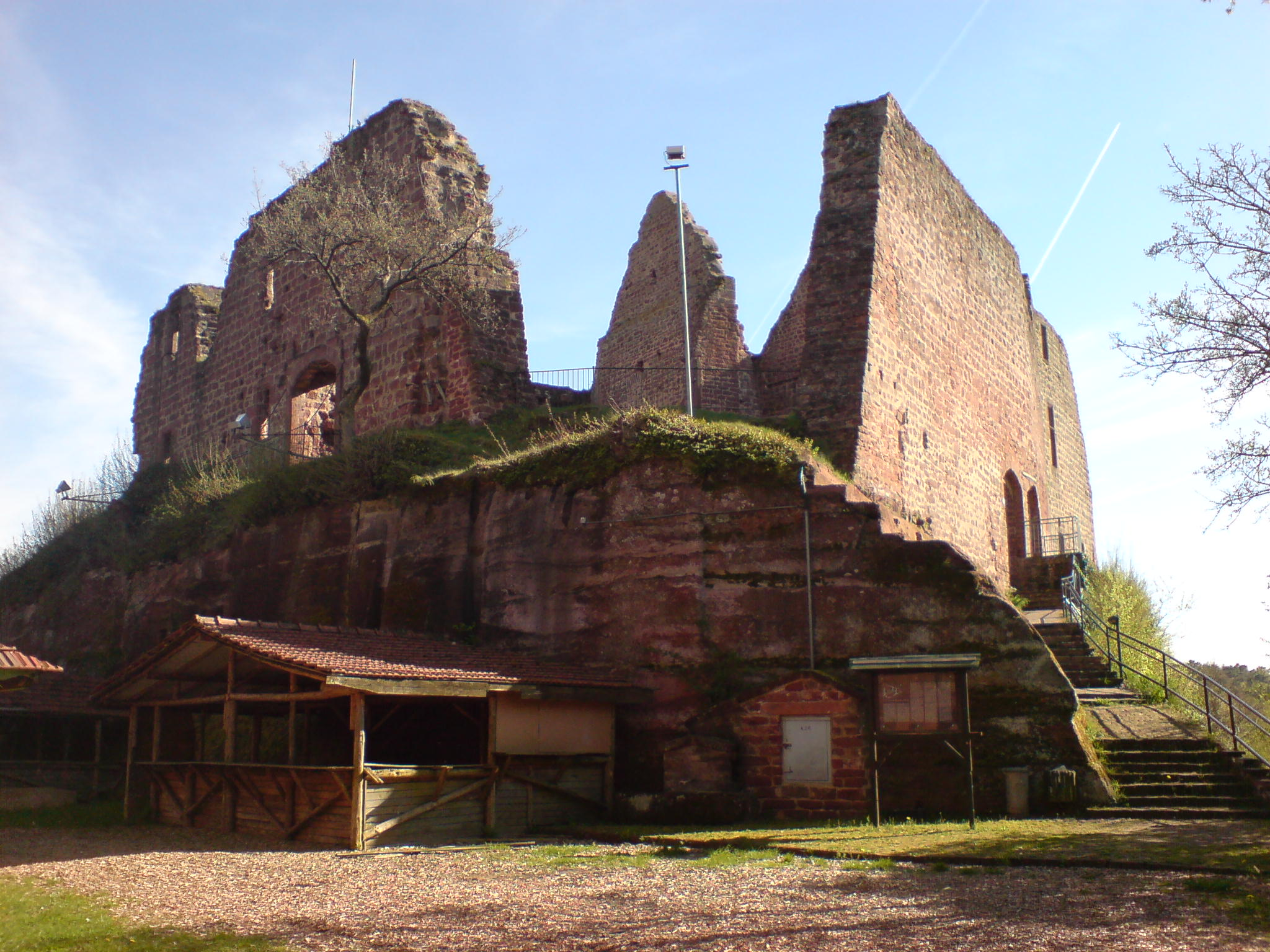 Burgruine Freudenburg